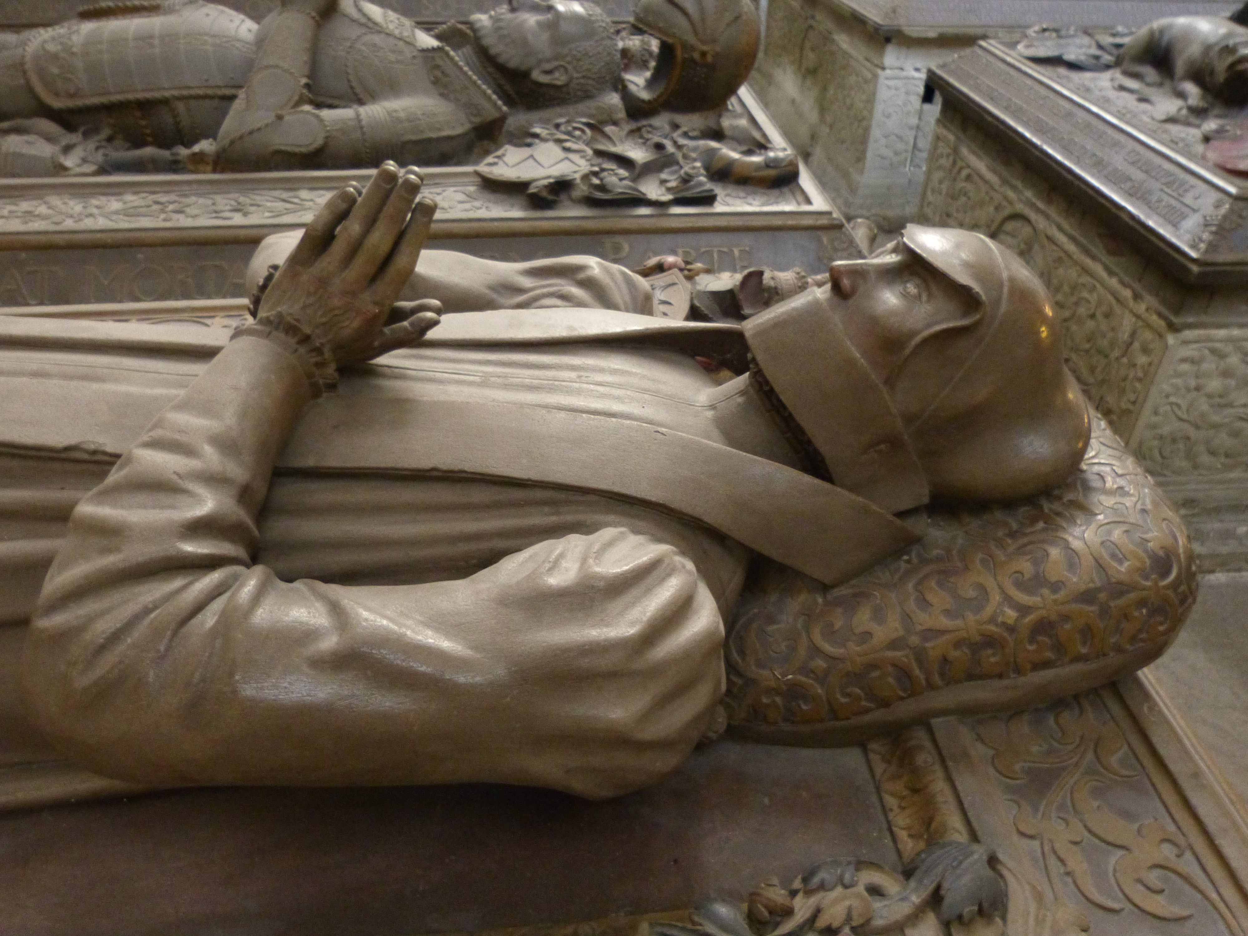 Grablege in der Stiftskirche von Tübingen, Baden-Württembergl